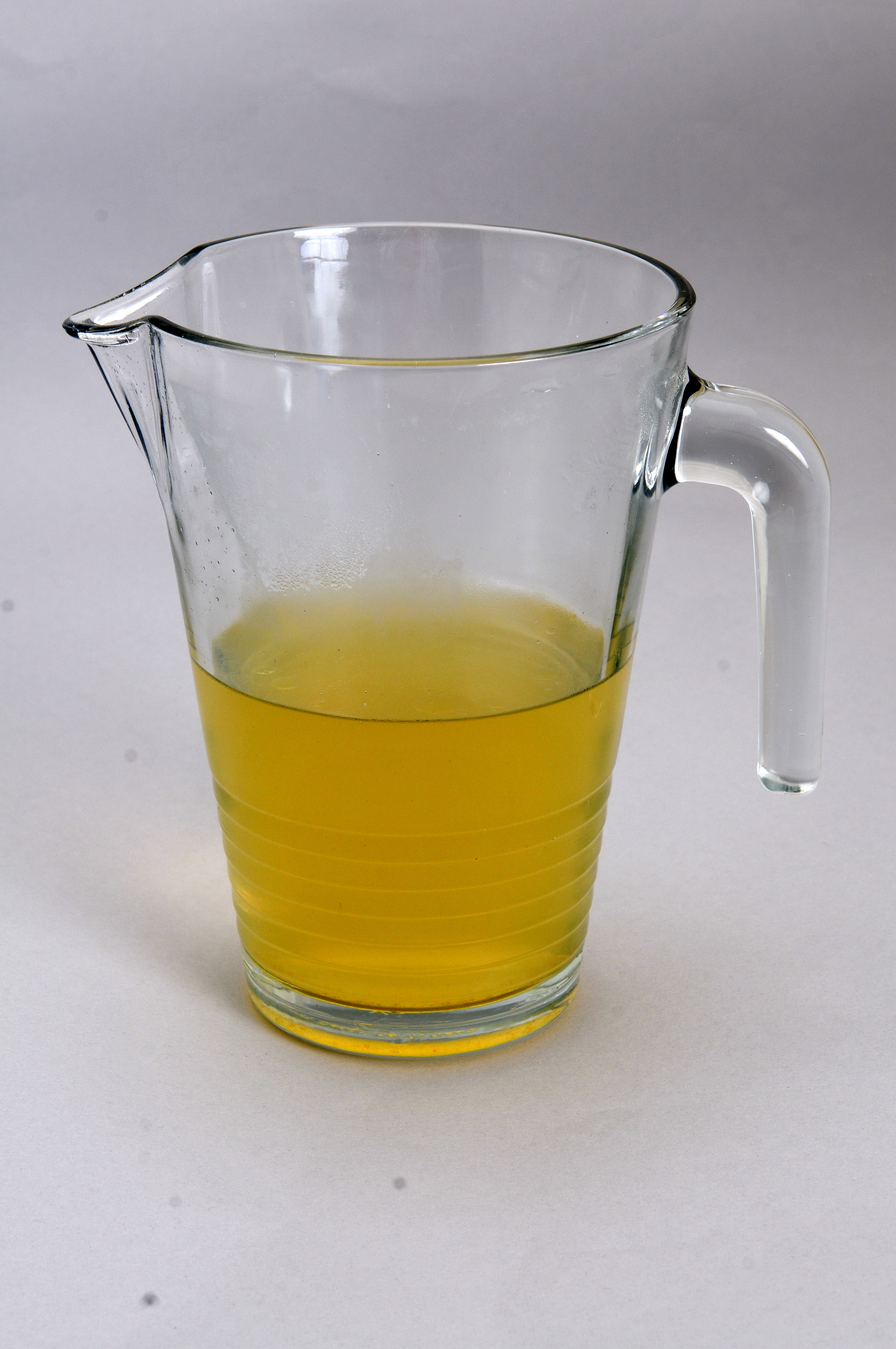 Treffen der Redaktion Essen und Trinken ion Wien